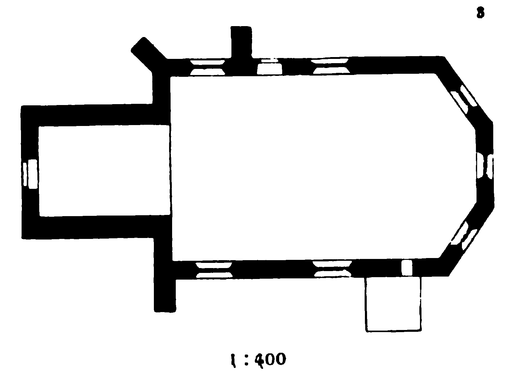 Grundriss der Ev. Kirche in Hausberge, Stadt Porta Westfalica